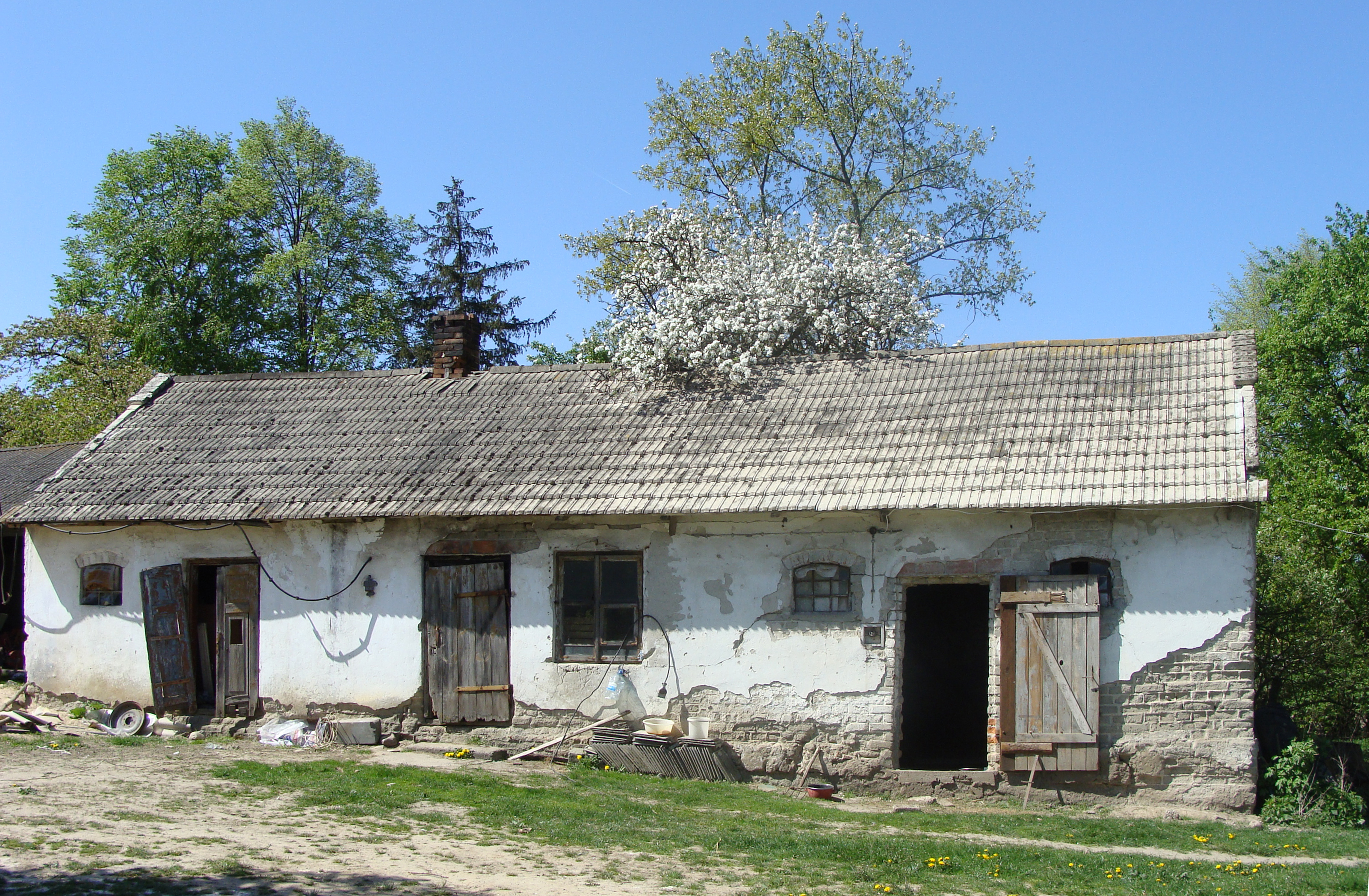 Spichrz i obora w ramach budynku gospodarczego starego typu, w małym gospodarstwie wiejskim.